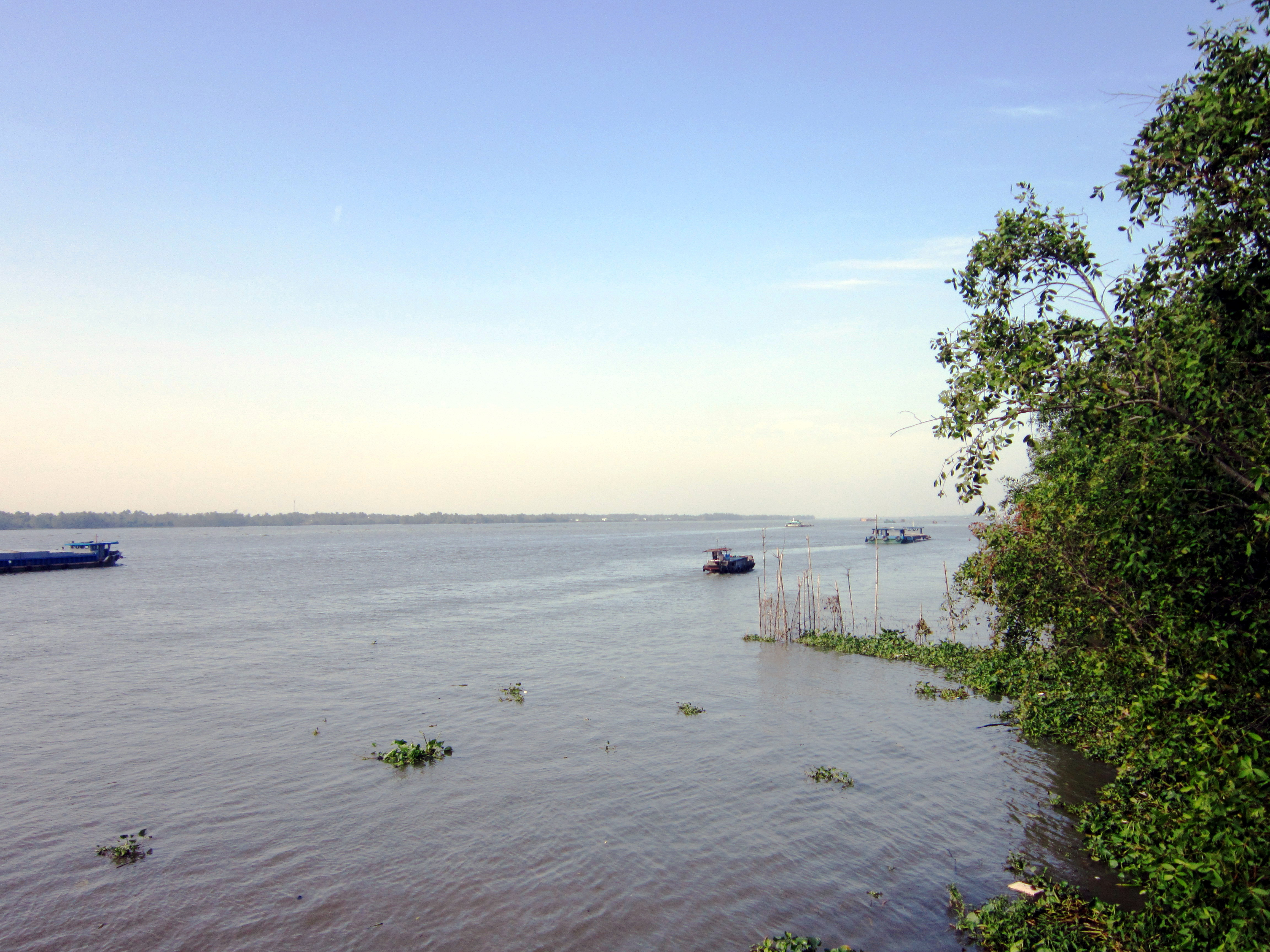 Đoạn sông Rạch Gầm-Xoài Mút ở huyện Châu Thành, tỉnh Tiền Giang, Việt Nam. Tại đây, ngày 20 tháng 1 năm 1785, quân Tây Sơn do tướng Nguyễn Huệ chỉ huy đã đánh bại 2 vạn quân thủy bộ của Xiêm La (Thái Lan ngày nay